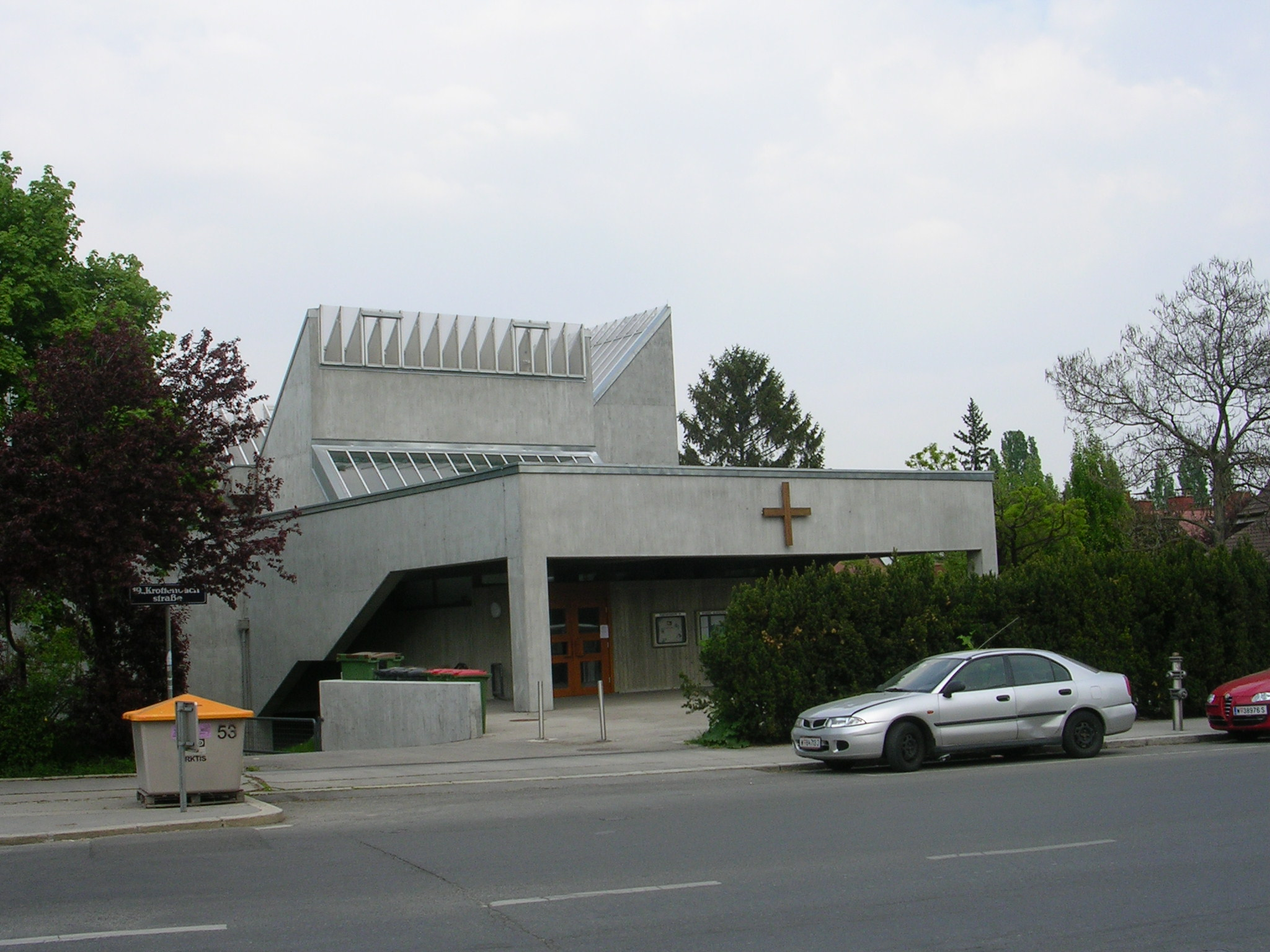 Pfarrkirche Glanzing von der Krottenbachstraße gesehen